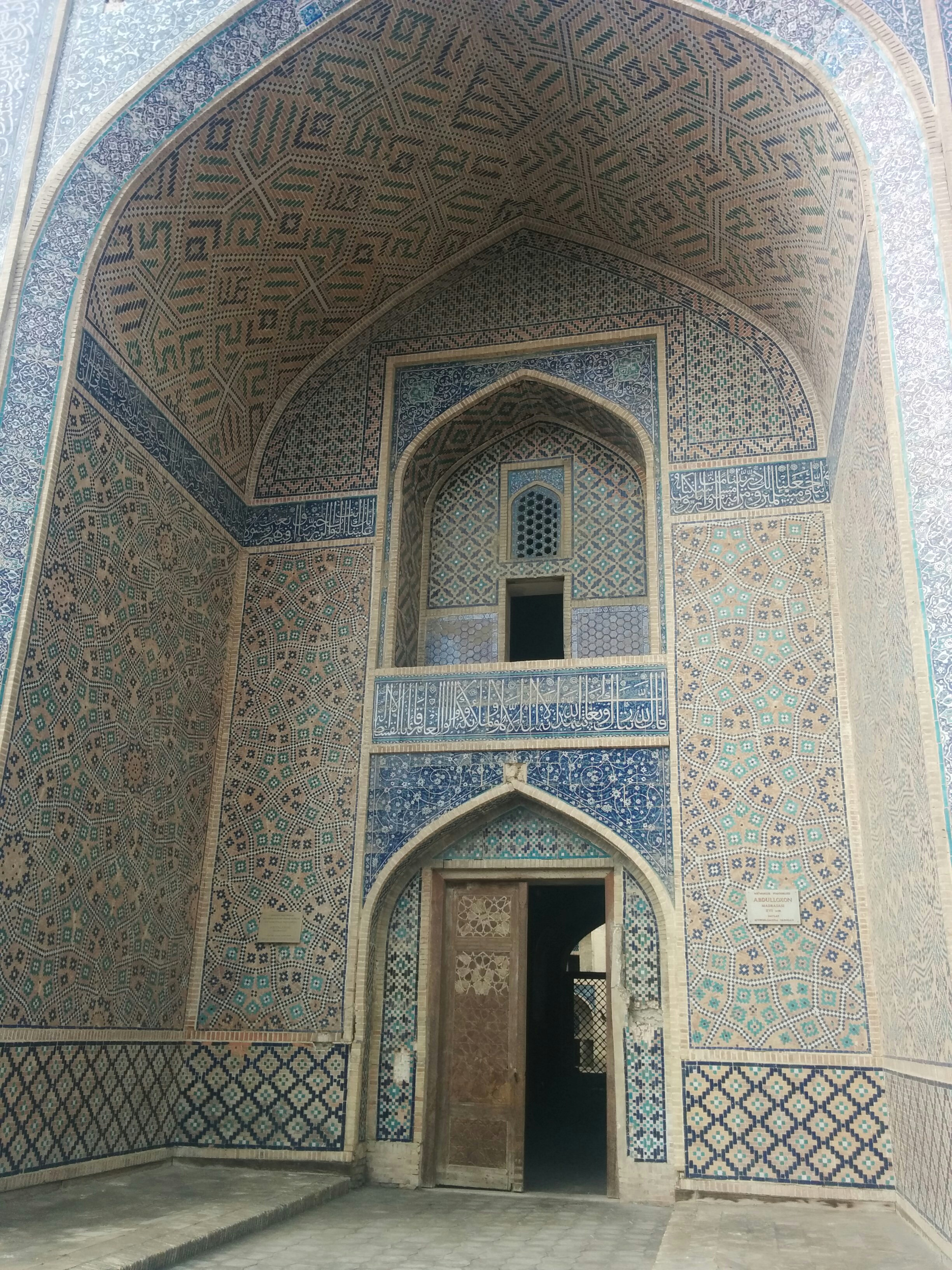 Buxorodagi Qo'sh madrasa ansamblining shimoliy qismida joylashgan me'moriy yodgorlik